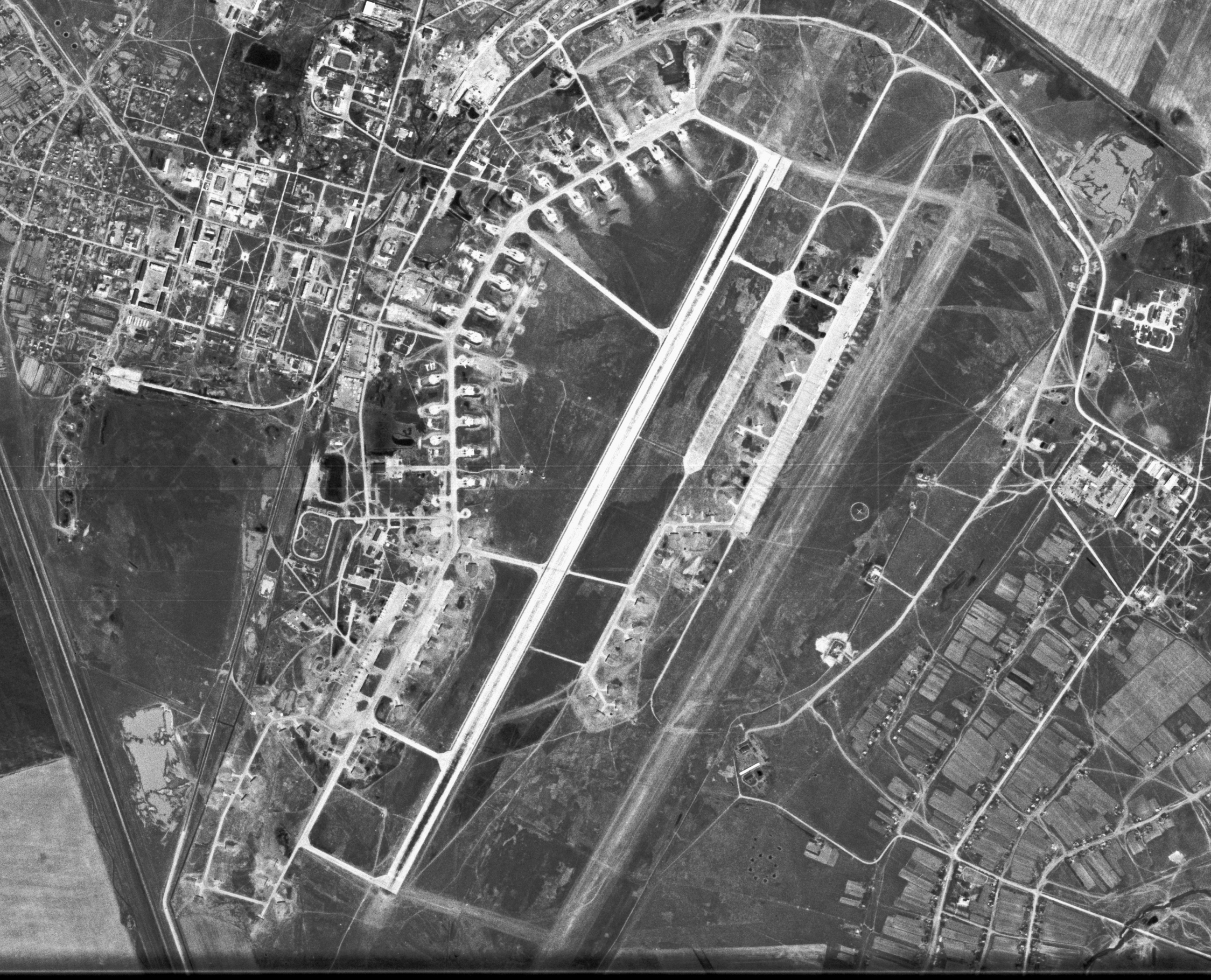 Depicted place: Vozdvizhenka